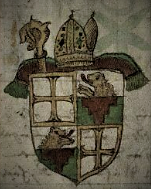 Wappen des Lübecker Bischofs Thomas Grote aus der Rehbein-Chronik